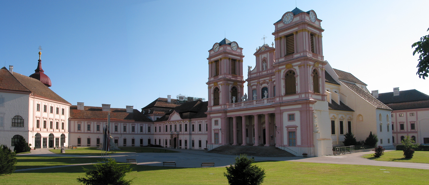 Stiftskirche und Stift, Panorama